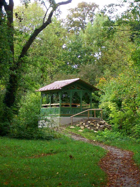 Pavillon im Garten der Mohr-Villa in Muenchen, Situlistr. 75